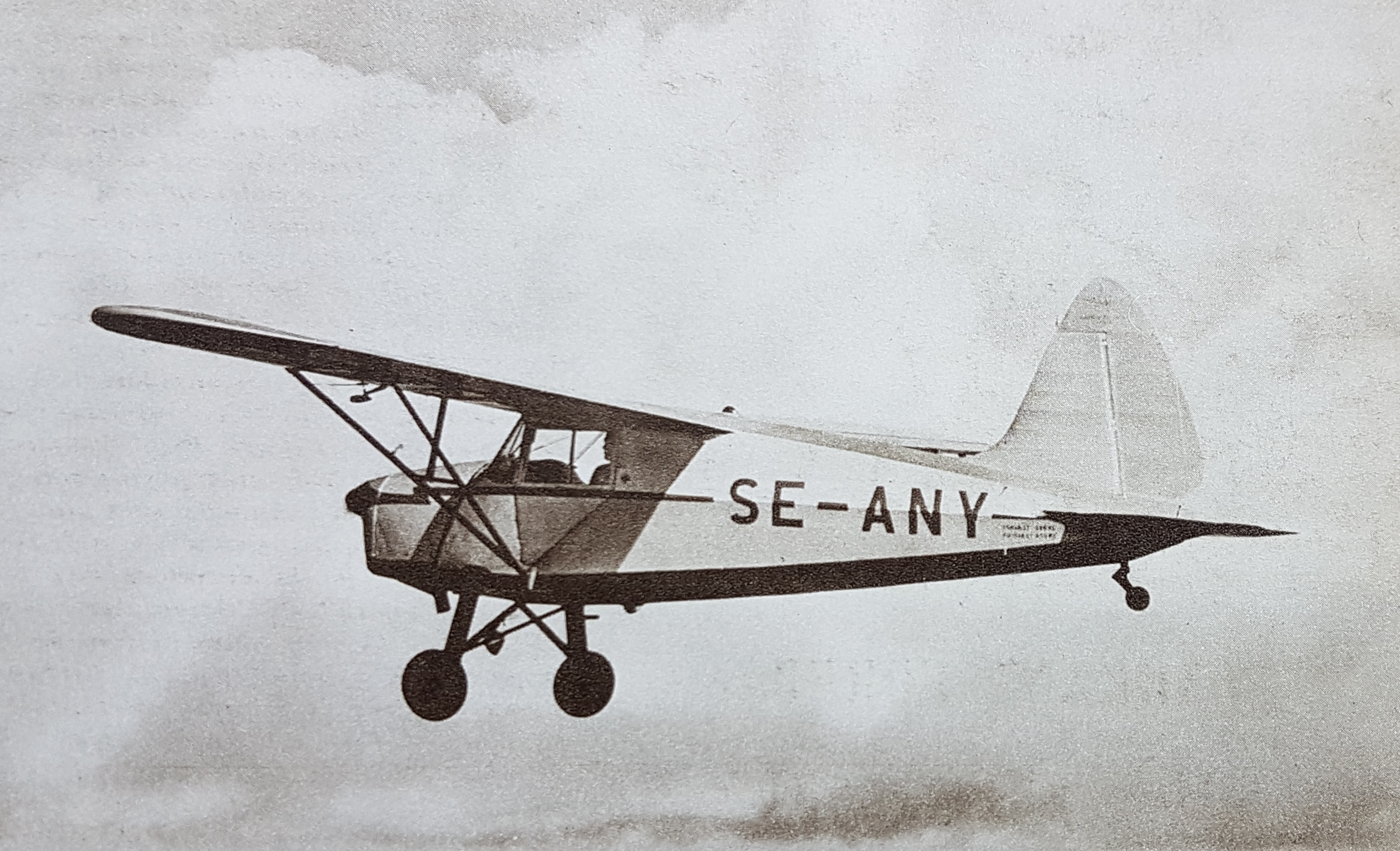 SE-ANY KZ-III